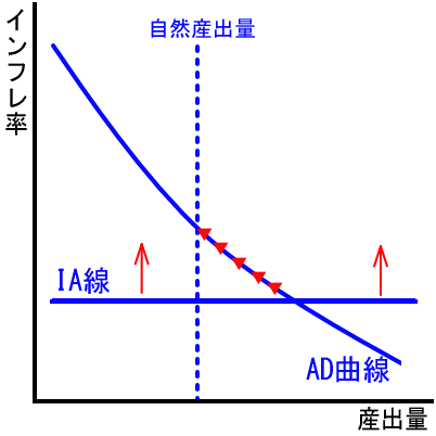 交点が潜在産出量の右側にあるのでIA線が上にシフトする